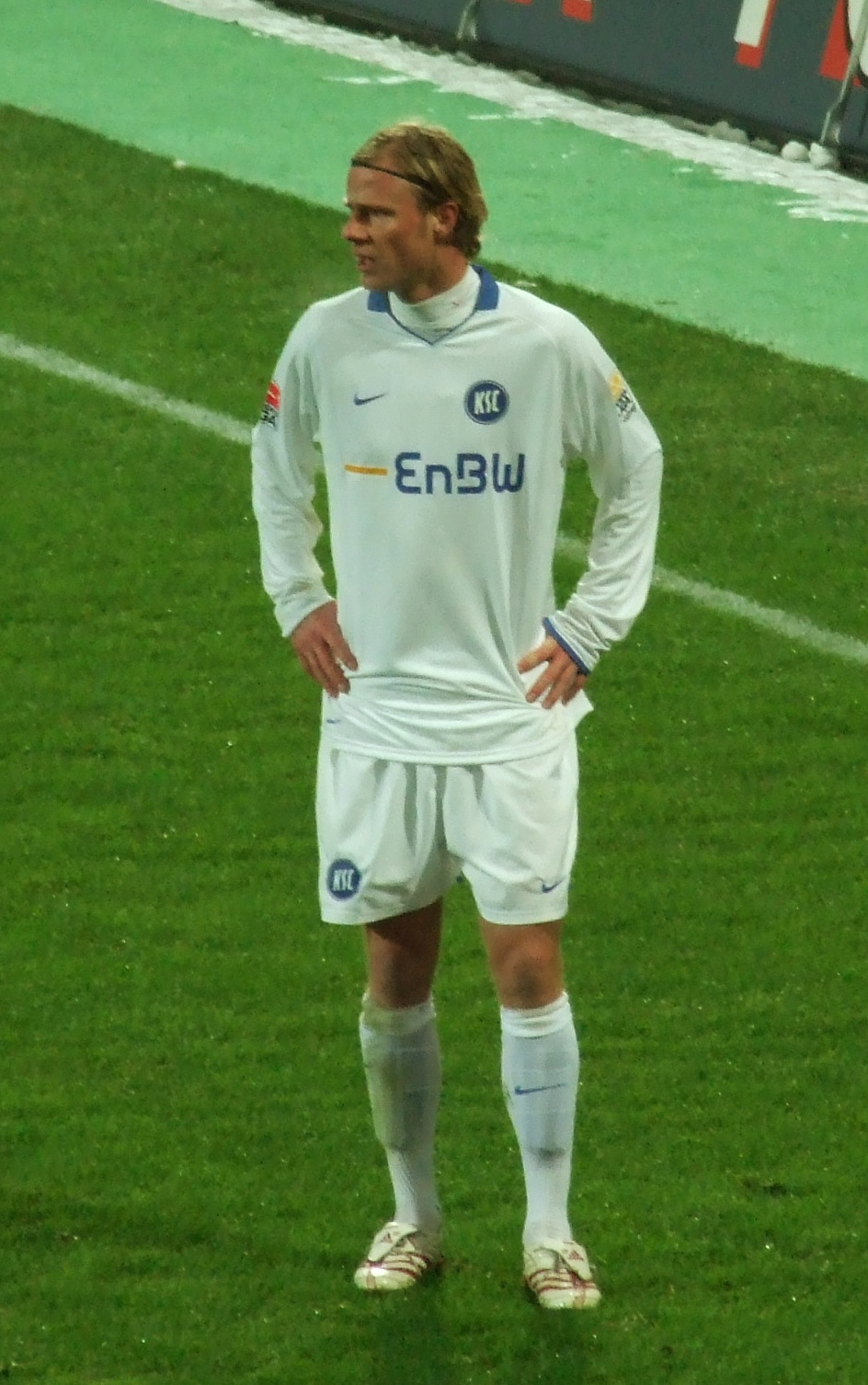 Marco Engelhardt beim Fußballspiel Alemannia Aachen - Karlsruher SC